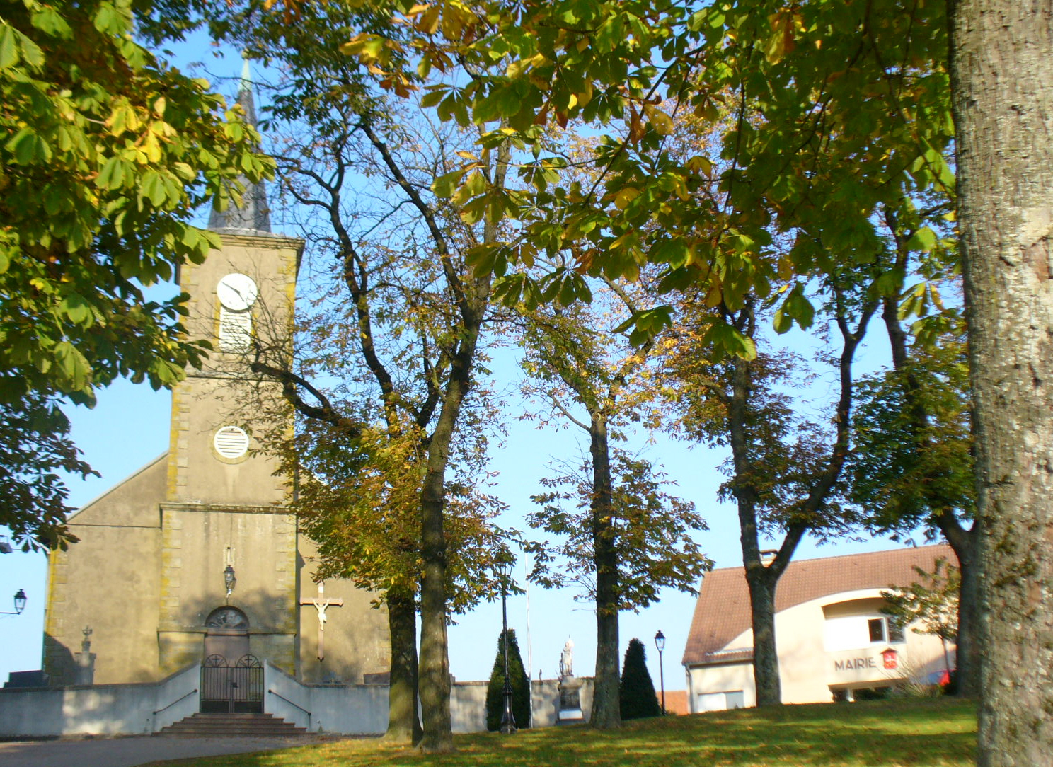 L'église d'Altviller et la place de la Mairie à Altviller